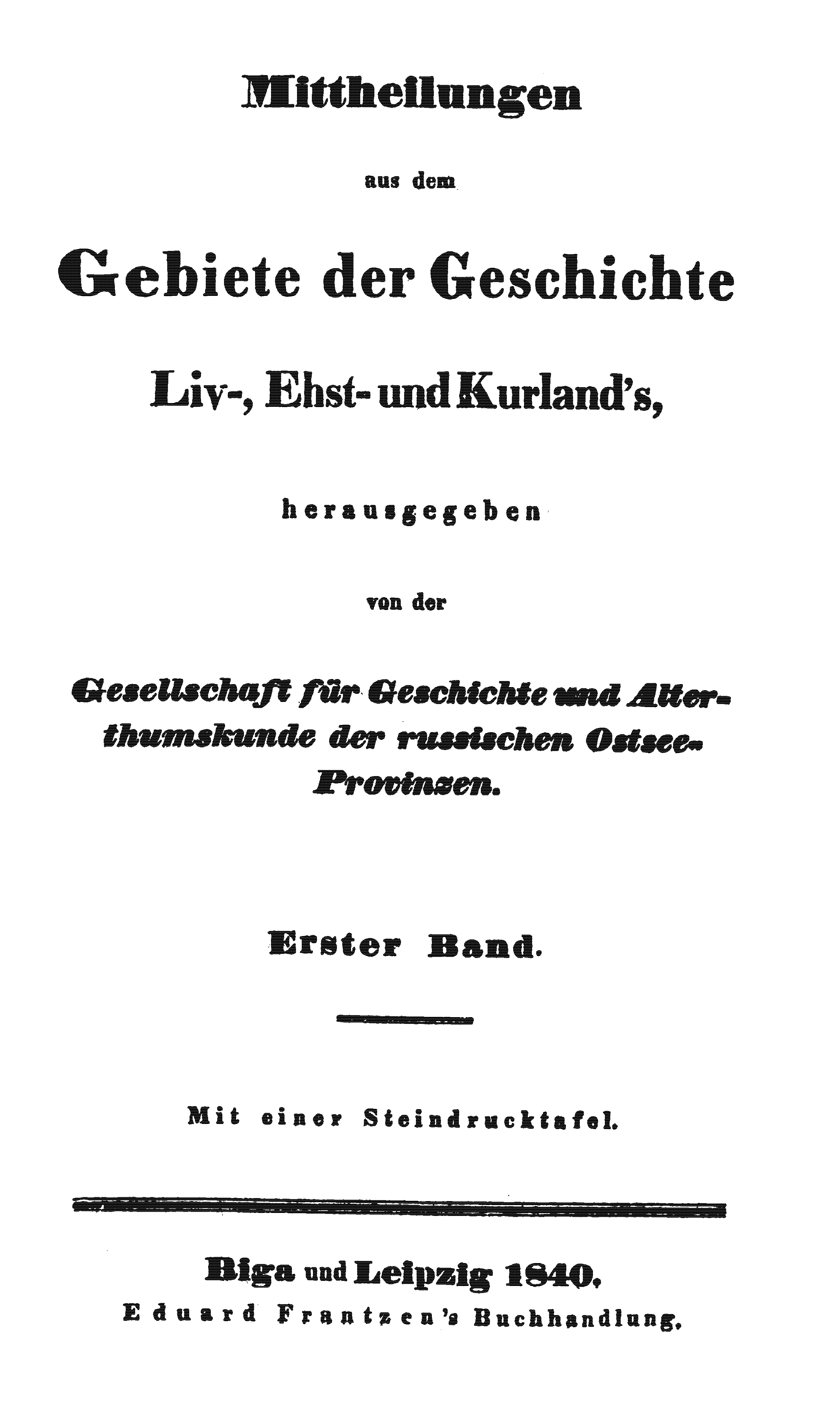 Titelseite der Zeitschrift / Title page of the periodical